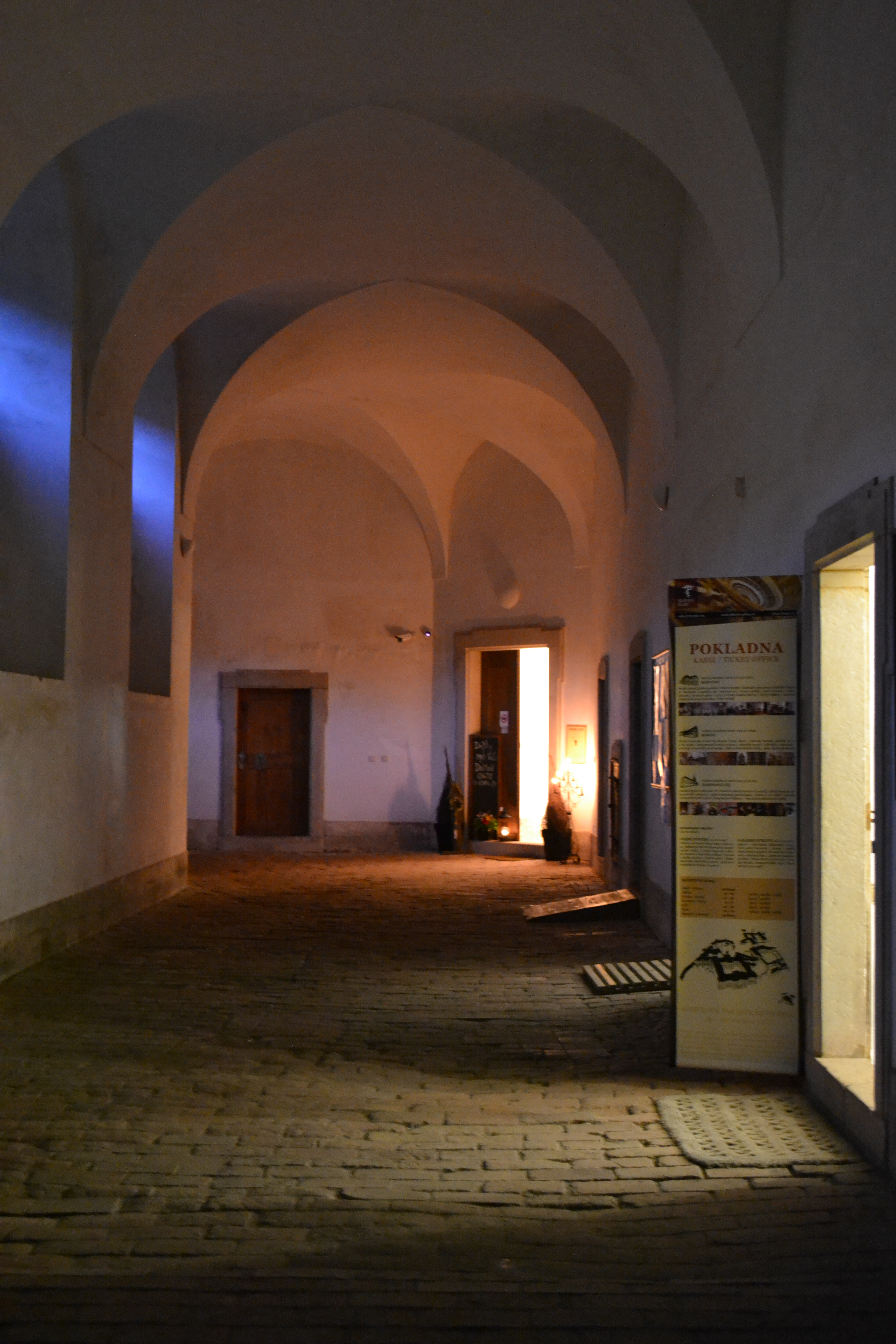 Interiér plaského kláštera - chodba